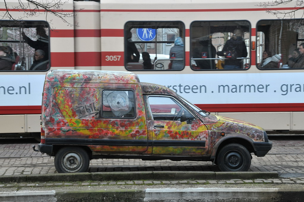 Brouwersgracht